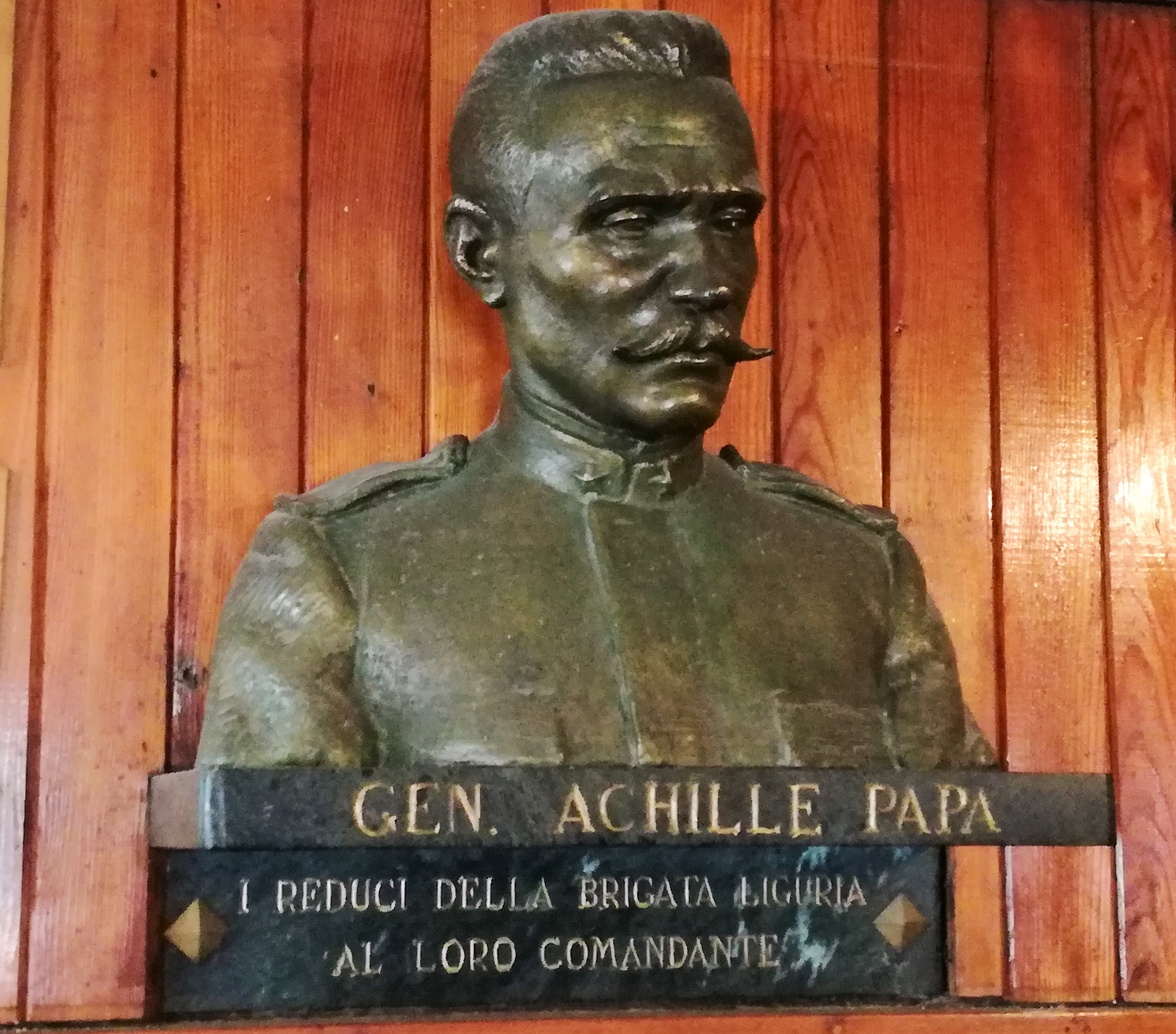 General Achille Papa - Büste im Rifugio Achille Papa